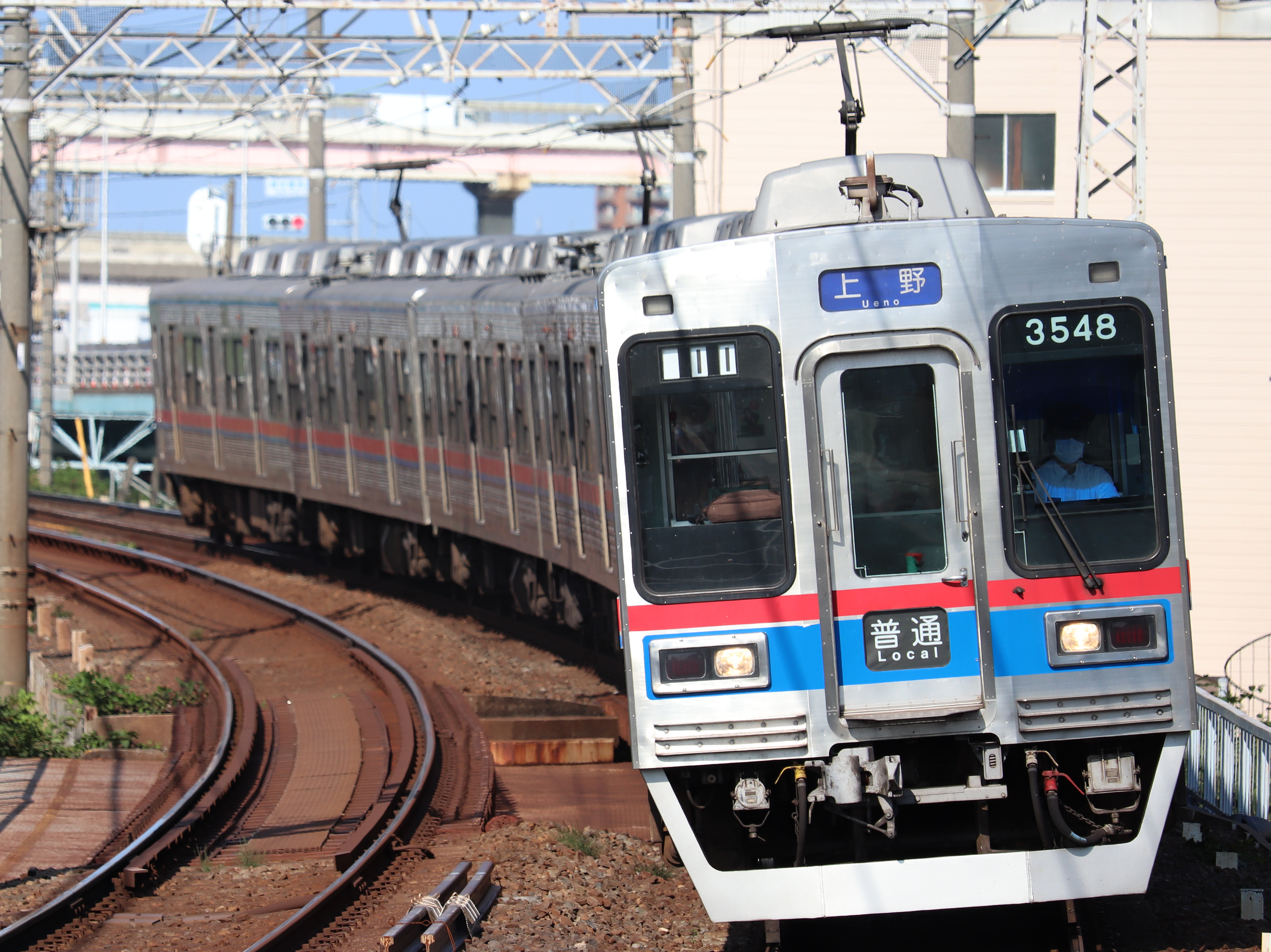 京成3500形 3512f+3547-3548 普通 上野行 京成関屋駅にて